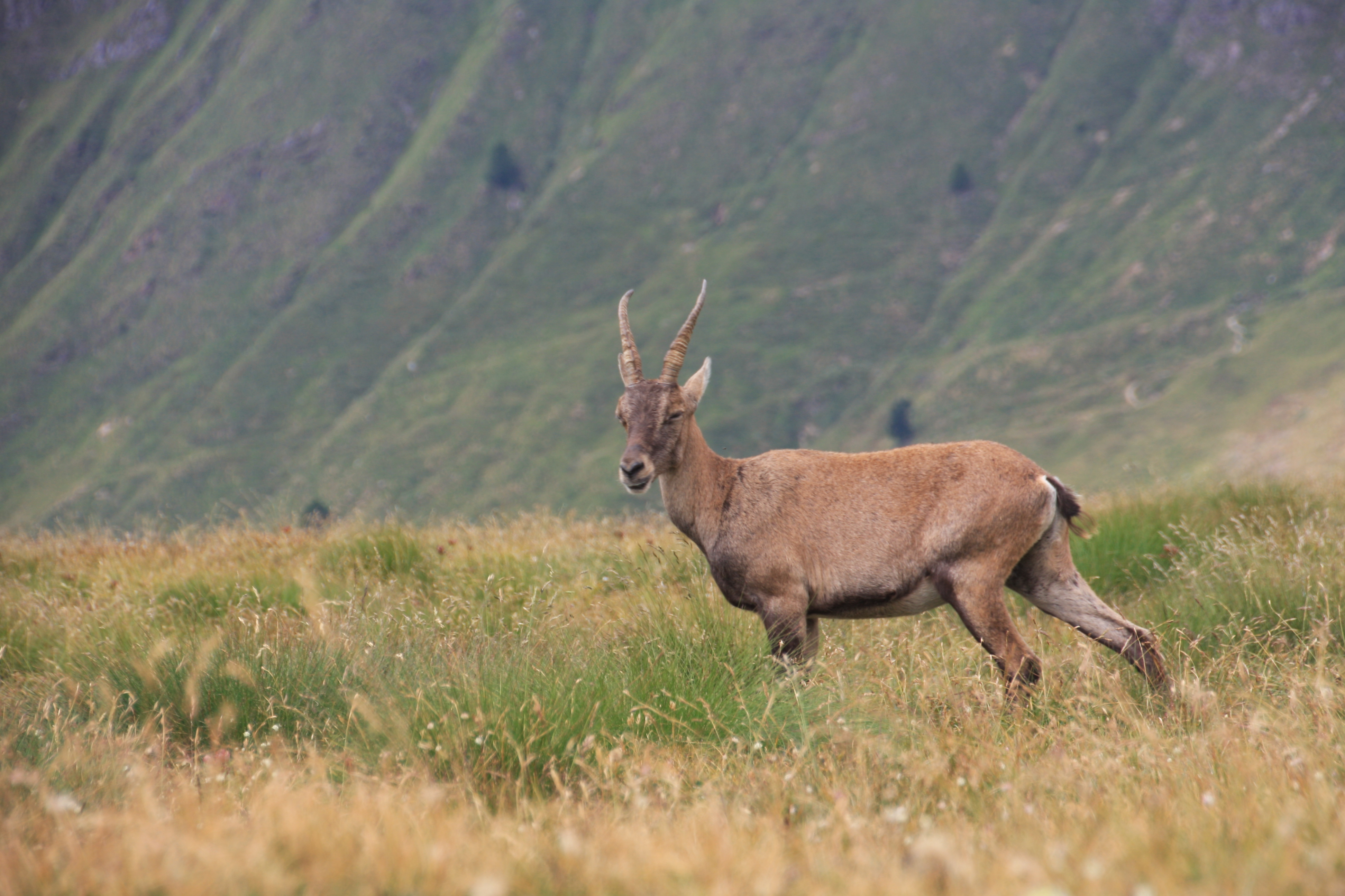 Stambecco, Capra ibex, cammina di spalle alla camera. Foto scattata sul sentiero che dal Rifugio Grassi giunge al Pizzo Tre Signori sulle Alpi Orobie il 31 luglio 2017.